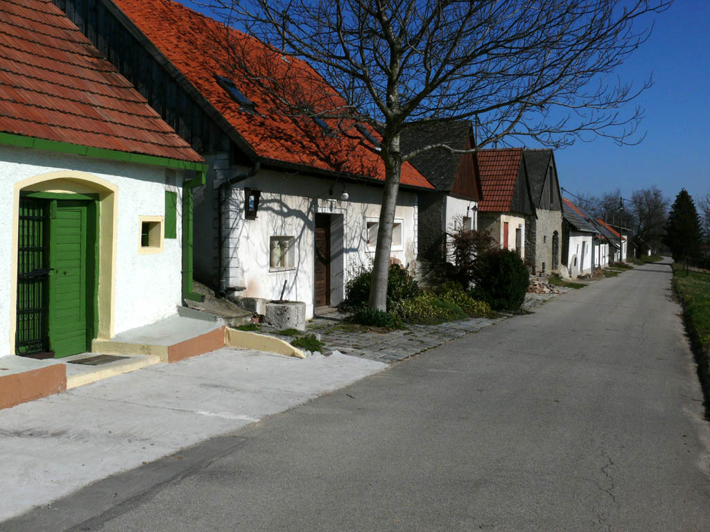 Groß Engersdorf; Kellergasse Satzgraben